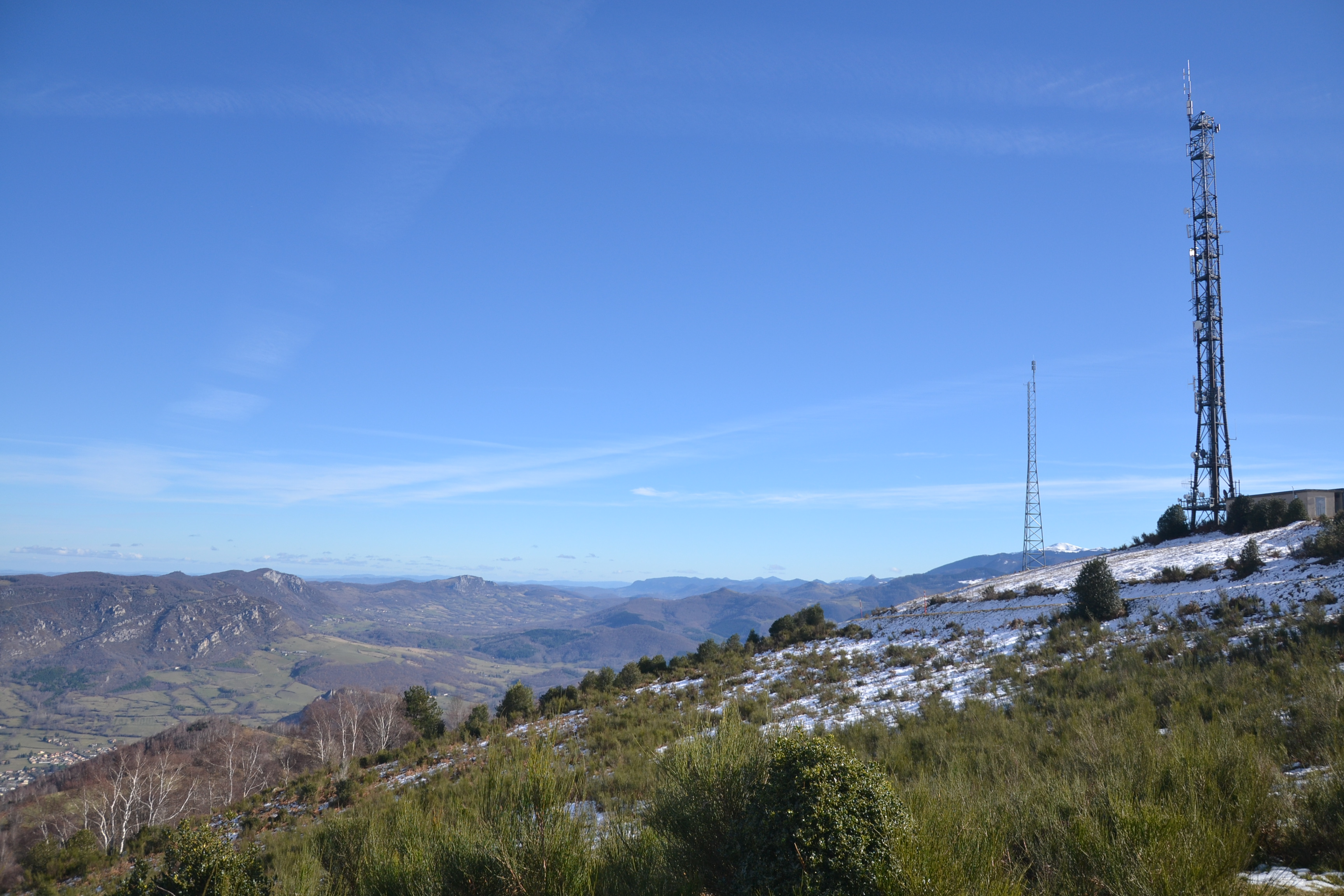 Paysage du Prat d'Albis, au-dessus de Foix (Ariège, France).